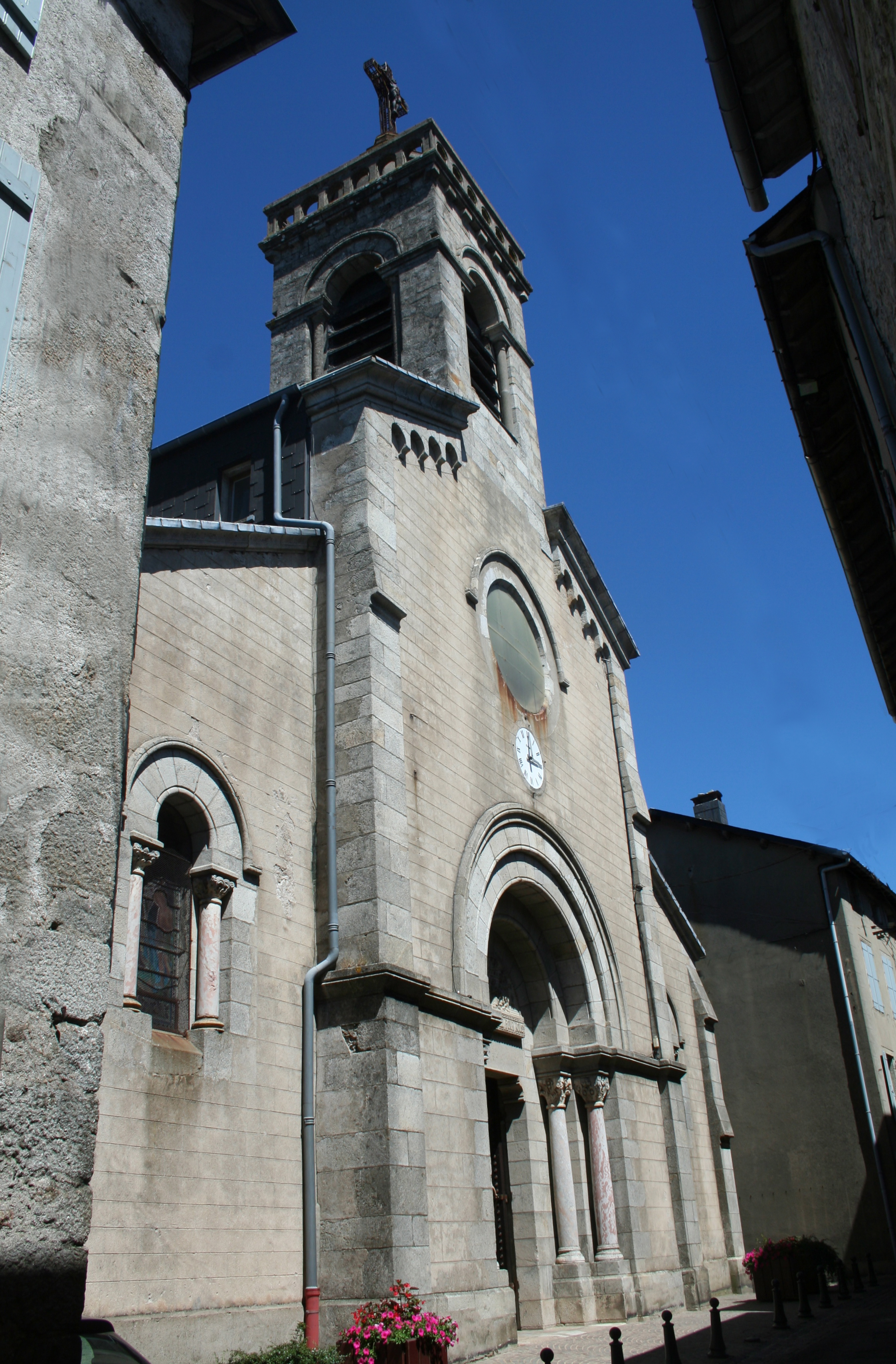 La Salvetat-sur-Agout (Hérault) - église Saint-Étienne - façade.